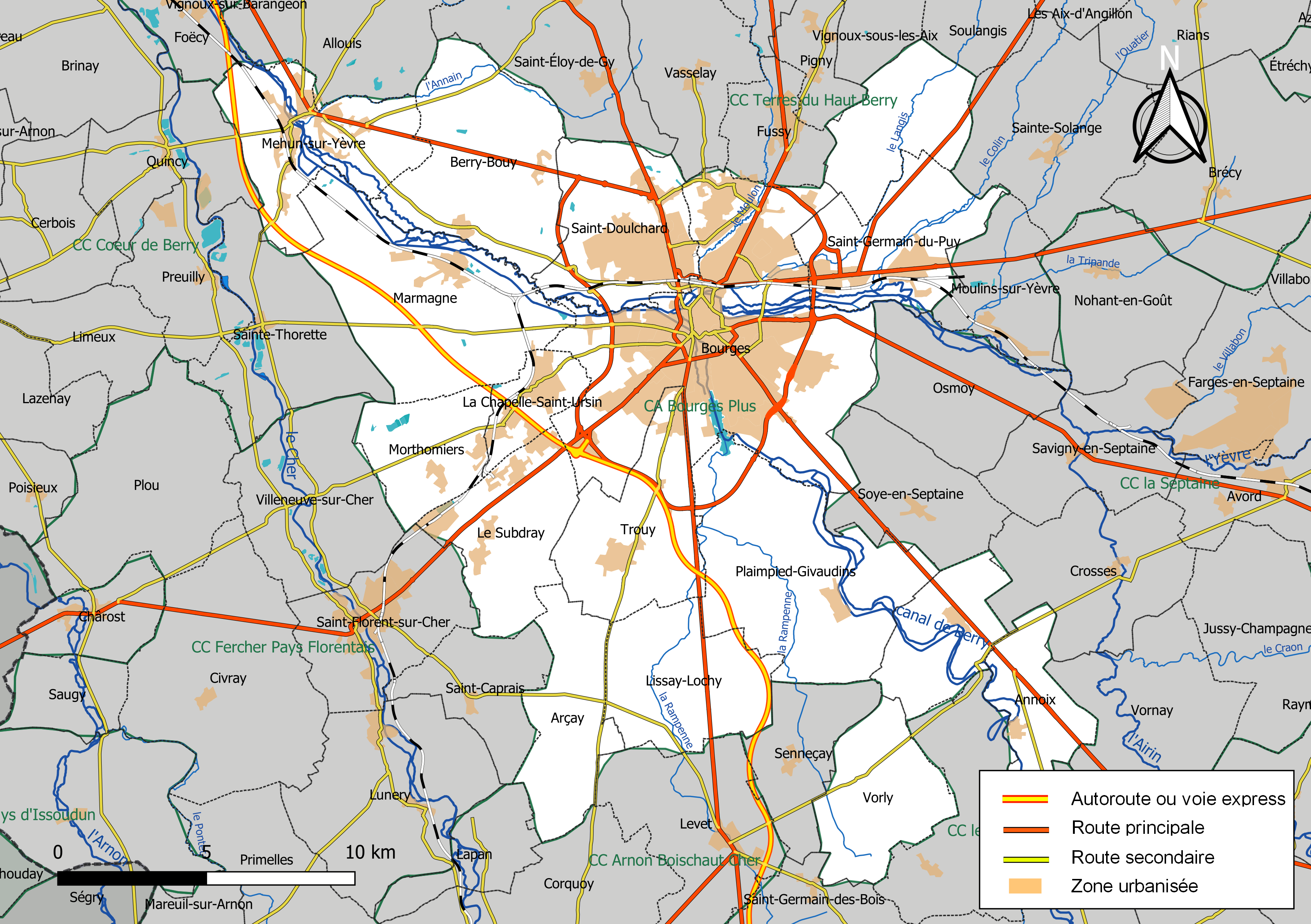 Carte géographique de la communauté d'agglomération Bourges Plus, département du Cher, France. Composition au 1er janvier 2019.